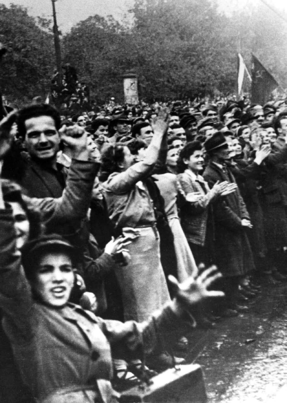 Srpskohrvatski / српскохрватски: Narod slavi oslobođenje Beograda oktobra 1944.